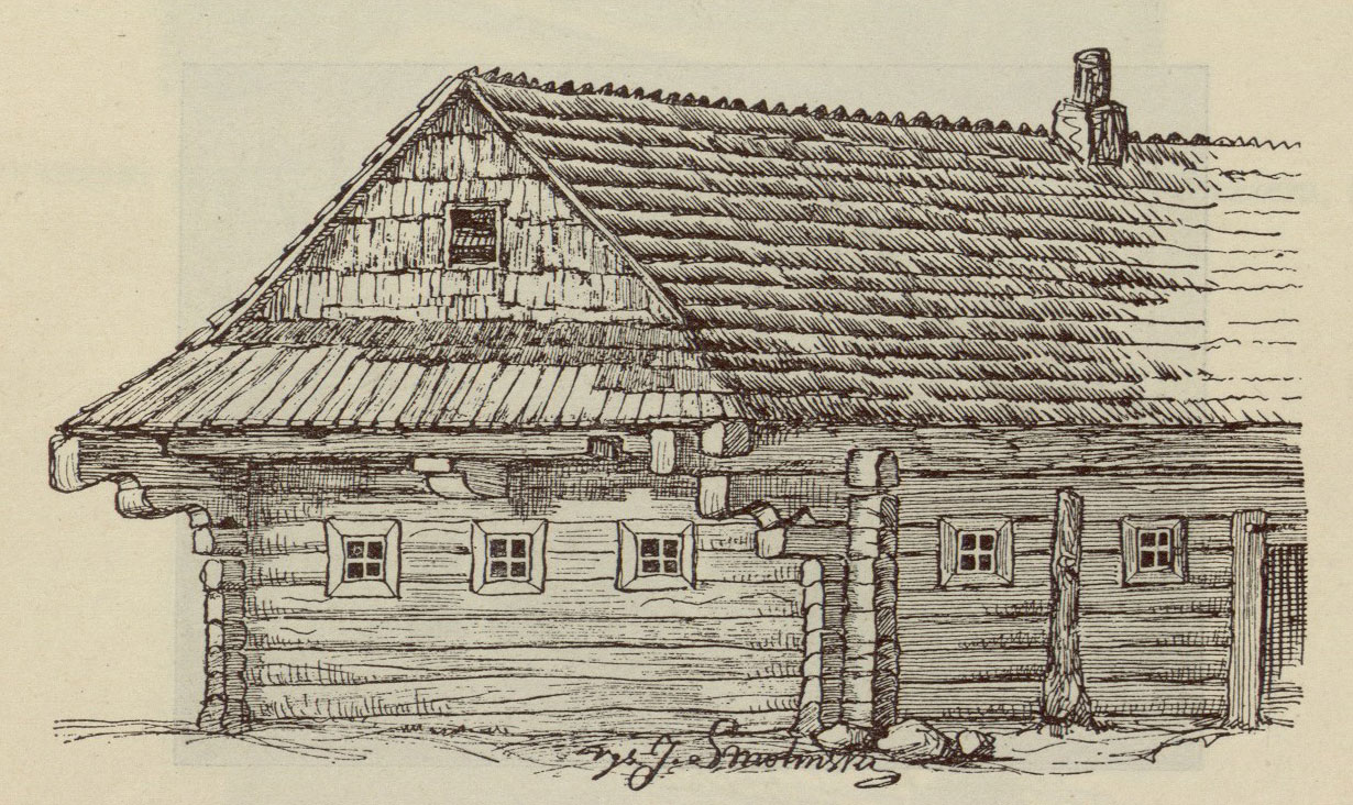 Беларуская (тарашкевіца): Нясьвіж (Niaśviž). Тыповы мяшчанскі дом